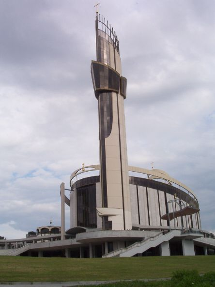 Łagiewniki Church in Kraków (from Polish Wikipedia)